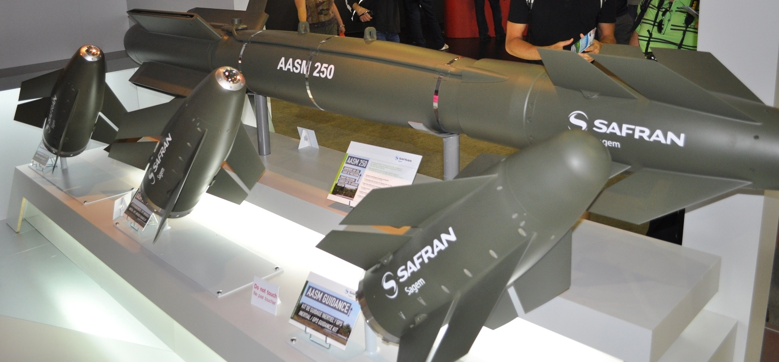 Armement air-sol modulaire, présenté au salon du Bourget 2011, stand Safran. Sont visibles : un AASM complet et les trois kit de guidage : INS/GPS/Laser, INS/GPS/infrarouge et INS/GPS.